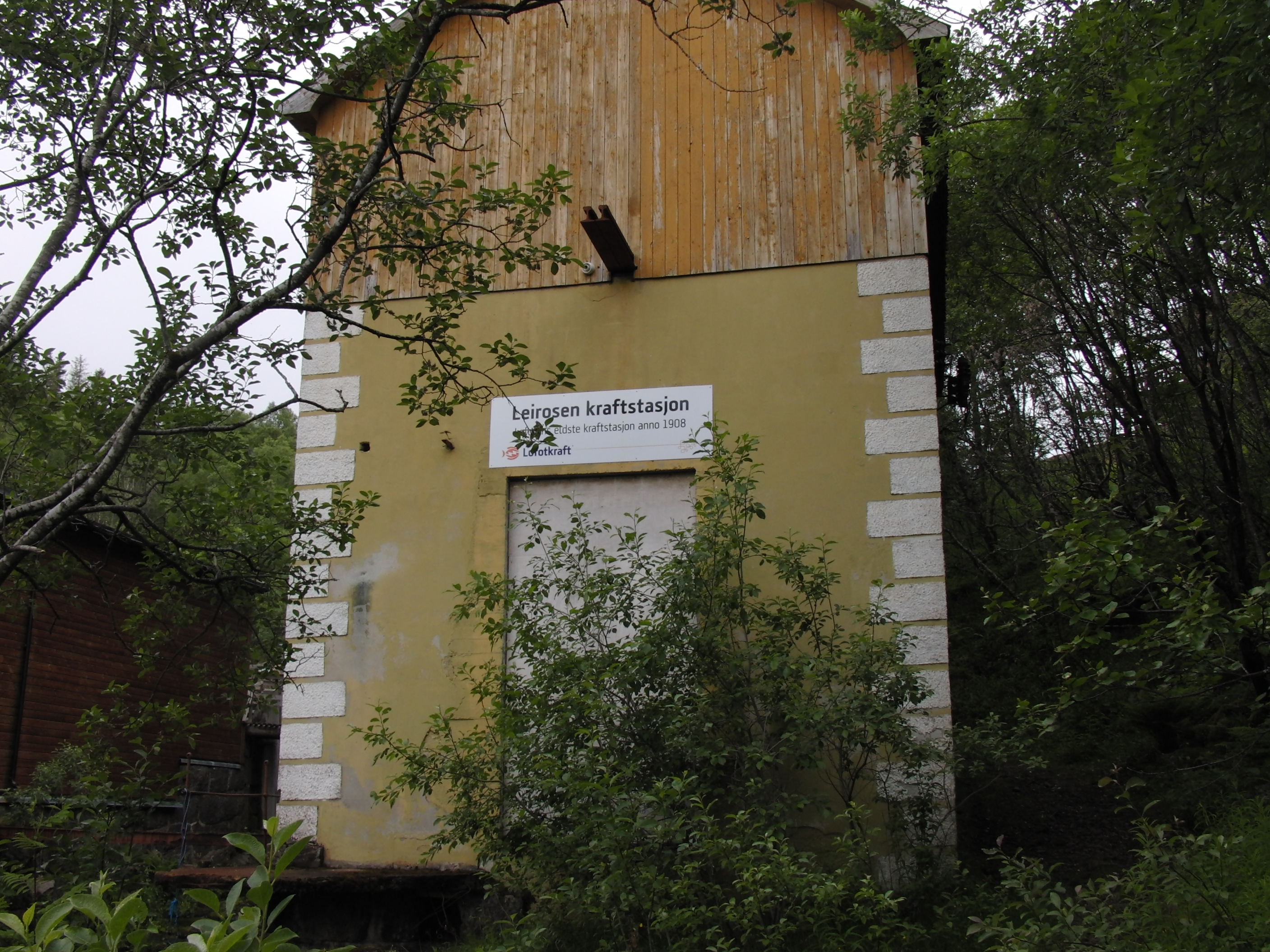 Gamle Leirosen kraftstasjon